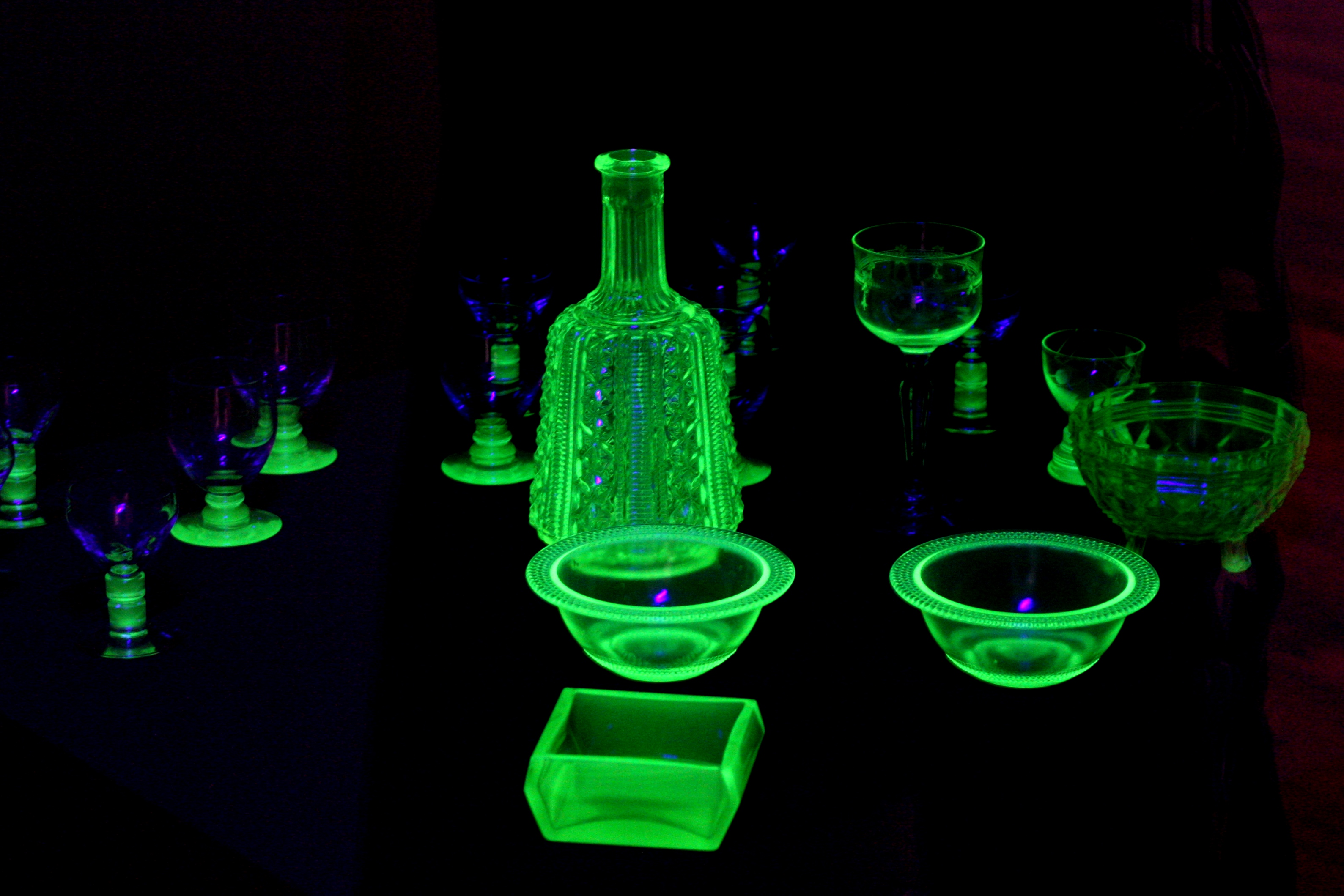 Uranium glass (Polke)